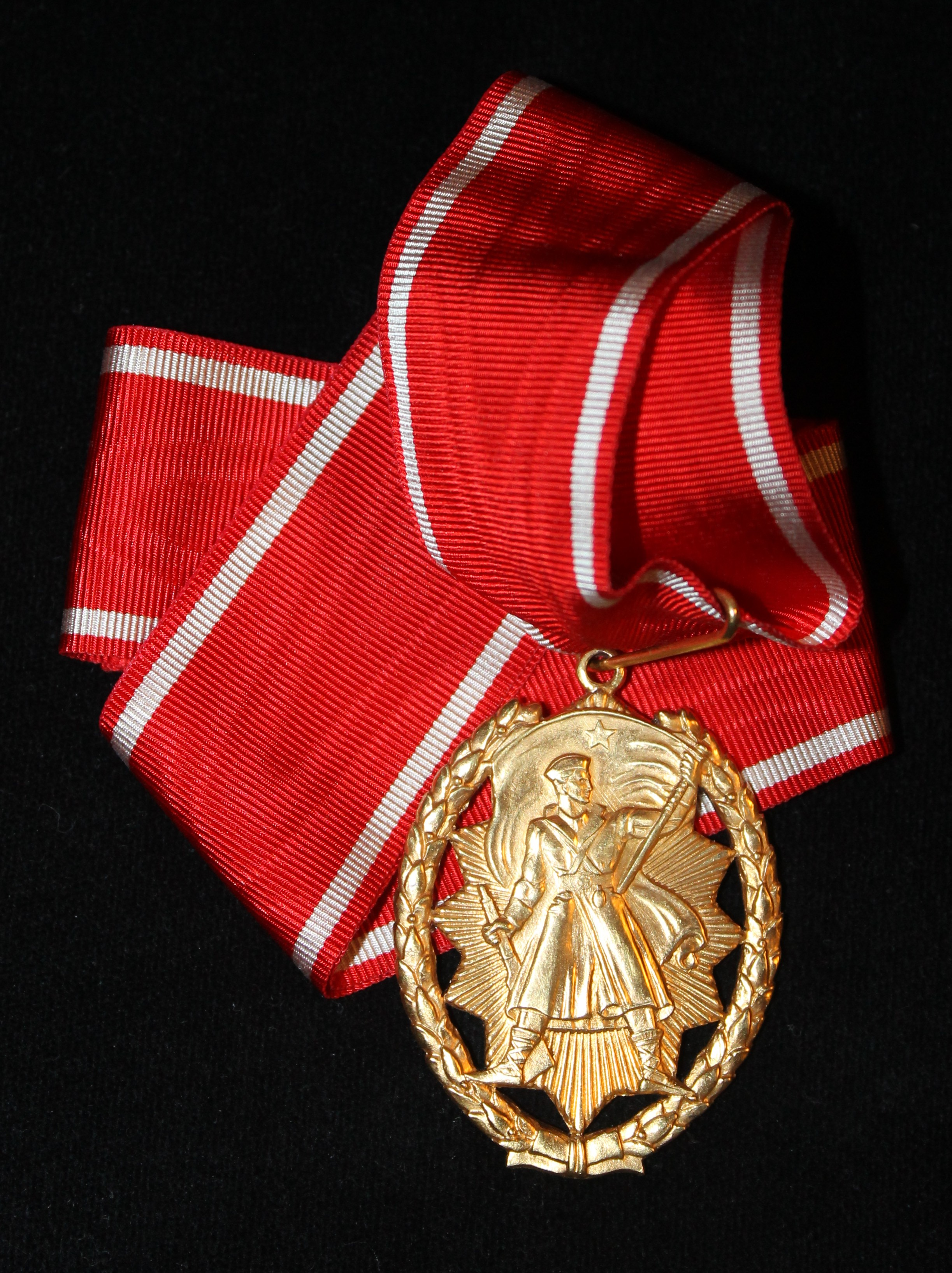 Орден народног хероја